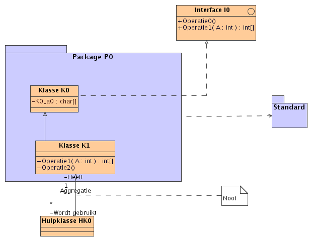 UML klasse diagram Zelf gemaakt met MagicDraw van NoMagic voor Wikipedia